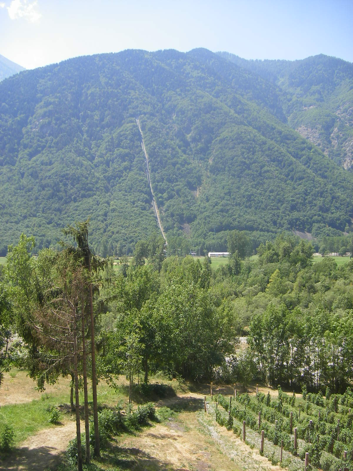 Landscape between Aisone and Vinádio